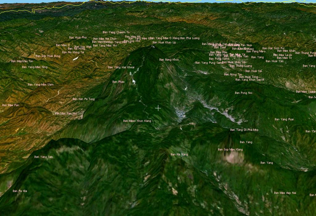 Deze afbeelding is een relief van het massief van de berg Doi Inthanon in Thailand bekeken vanaf de zuidkant. Duidelijk zichtbaar is de toegangsweg aangelegd naar de top. De gele lijn in de achtergrond is de grens met Myanmar. This picture is a relief of the range of Thailands highest mountain Doi Inthanon. The image was created looking from the southside of the mountain. Clearly visible is the road leading to the top. The yellow line in the background is Thailands border with Myanmar.